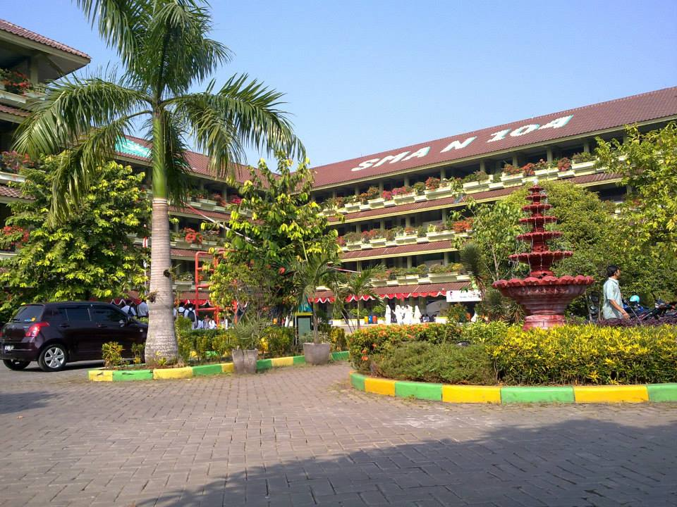 Ini adalah foto gedung sekolah saya yang dipotret oleh teman sekelas saya dan saya telah mendapat izin untuk mengunggahnya ke Wikimedia Commons.